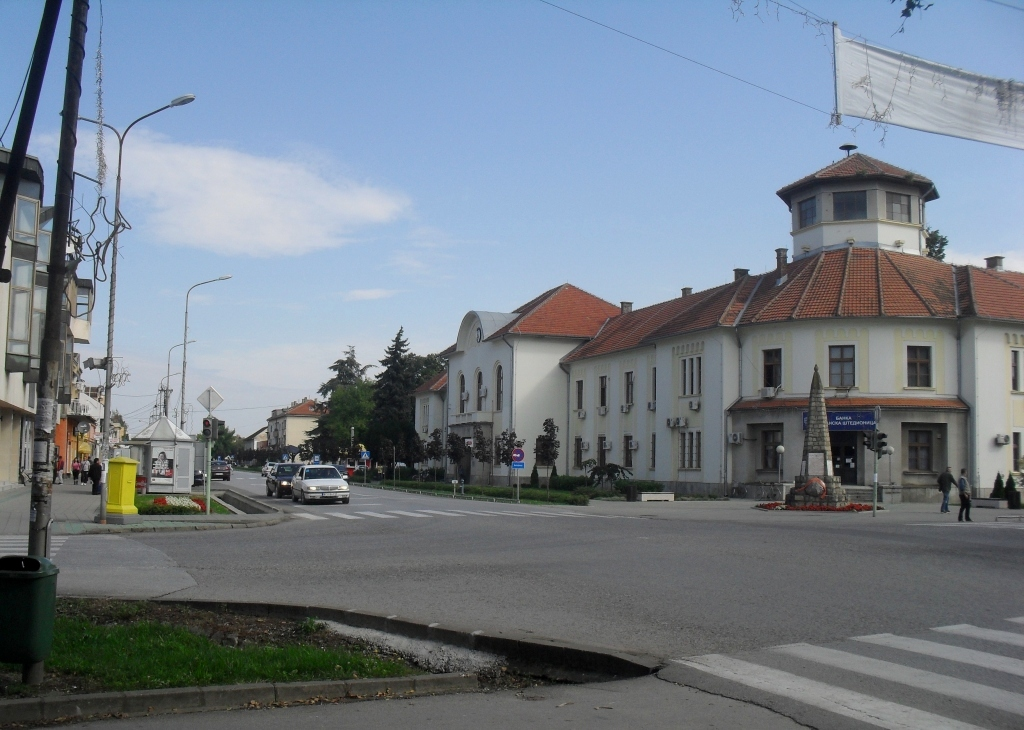 Центар Богатића, десно зграда општине Богатић, Мачва, Србија.